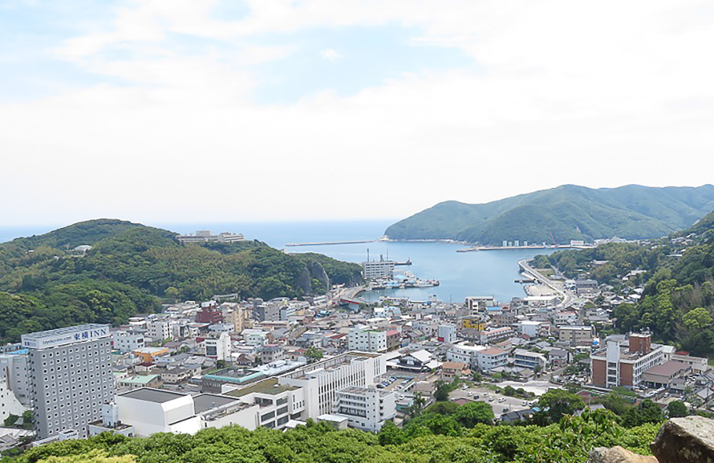 清水山からの厳原市街地風景（2017年5月撮影）